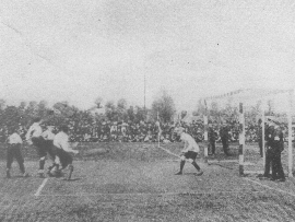 Actiefoto tijdens de wedstrijd Nederland-België, met de Engelsman Eric Thornton in het Belgische doel, hetgeen toen nog reglementair was.